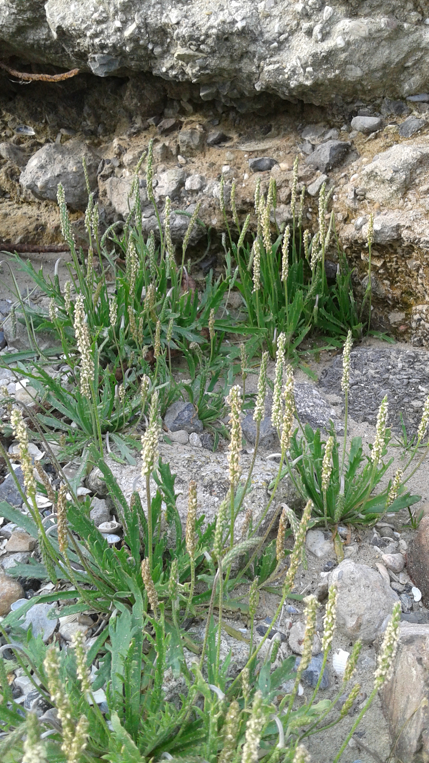 plantain corne de cerf digue du break 59140